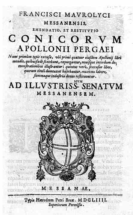 Francisci Maurolyci Messanensis, Emendatio, et restitutio conicorum Apollonij Pergaei nunc primum typis excusae, vbi primi quatuor eiusdem Apollonij libri mendis, quibus foede scatebant, expurgantur, nouisque interdum demonstrationibus illustrantur: quintus vero sextusue liber, quorum tituli dumtaxat habebantur, maximo labore, summaque industria denuo restituuntur. - Messanae : typis heredum Petri Breae, 1654. - [8], 5-192 p. : ill. ; 2° .